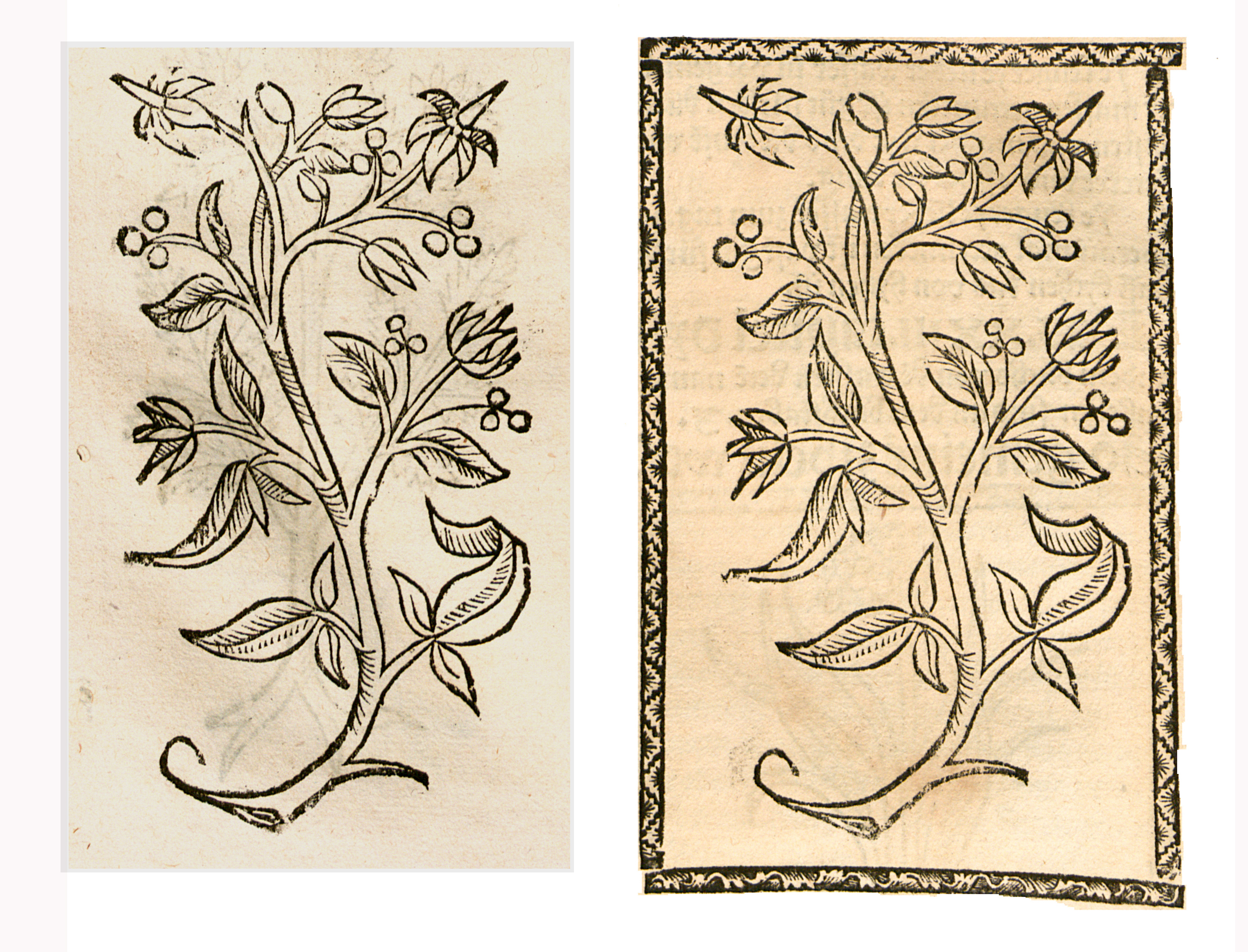 Abbildung von: Ye lenger ye lieber (Solanum dulcamara)